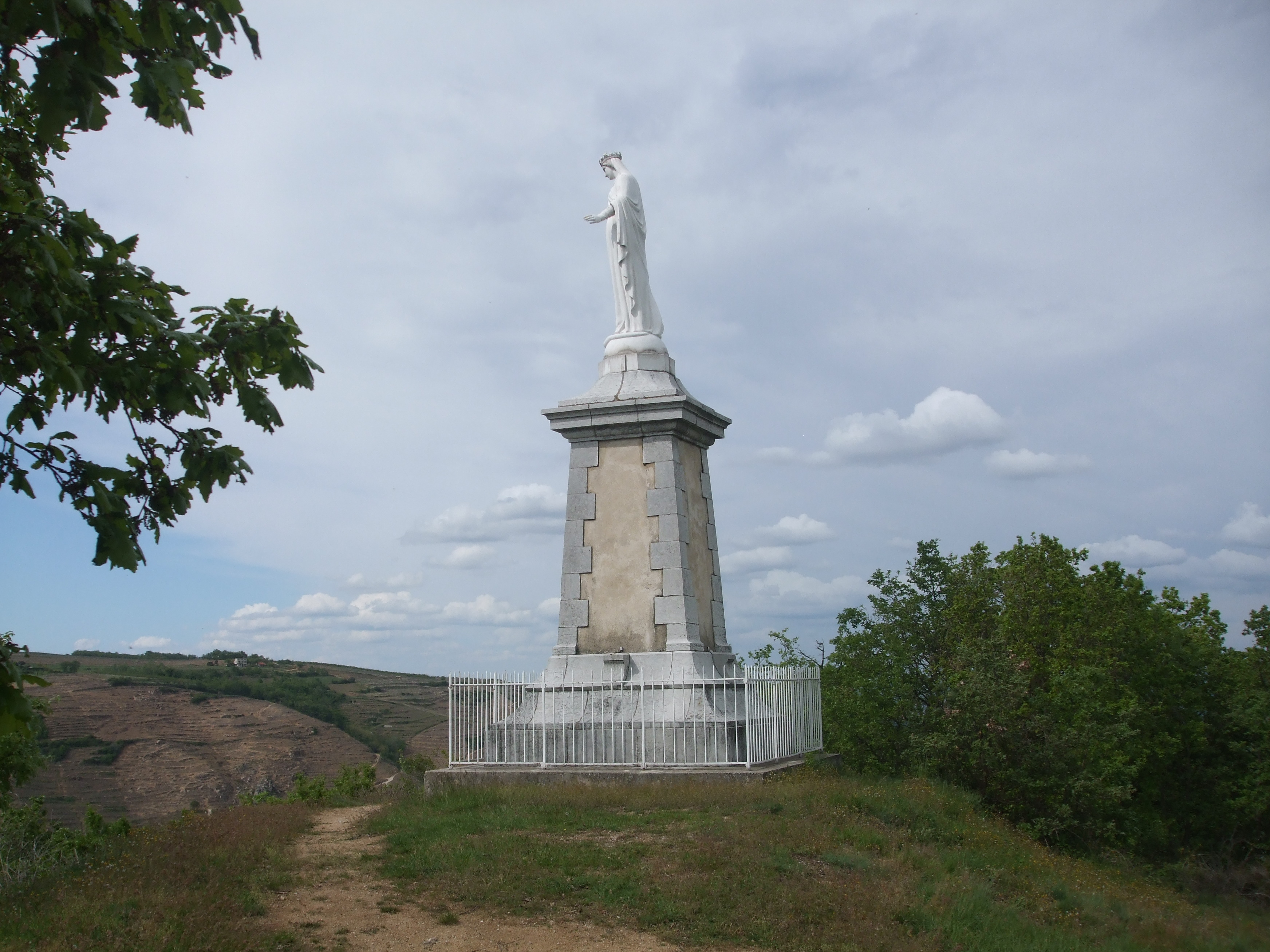 statue de la vierge surplombant le village de Saint-Désirat (Ardèche)